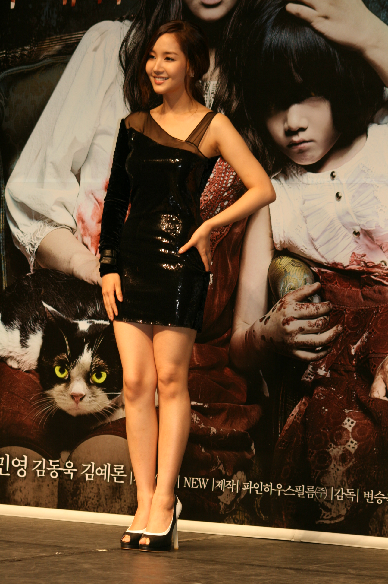 2011년 6월 17일 열린 영화 《고양이: 죽음을 보는 두 개의 눈》 제작보고회에 참석한 박민영.